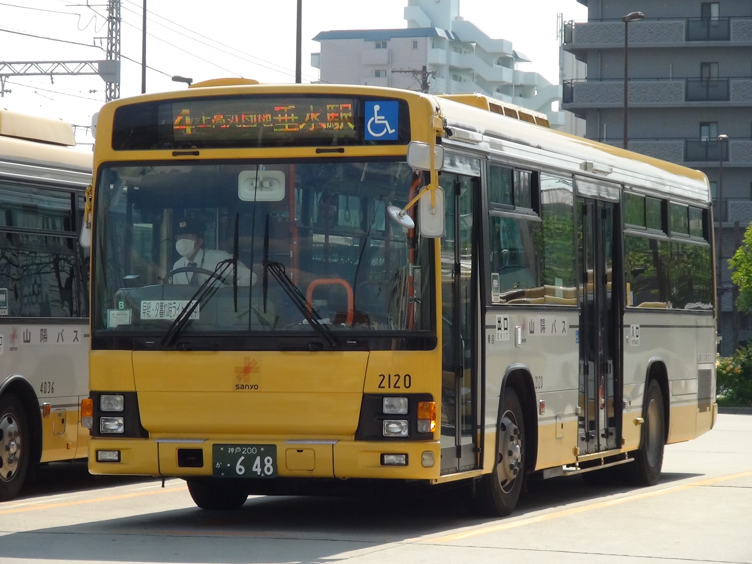 山陽バスの主な車両